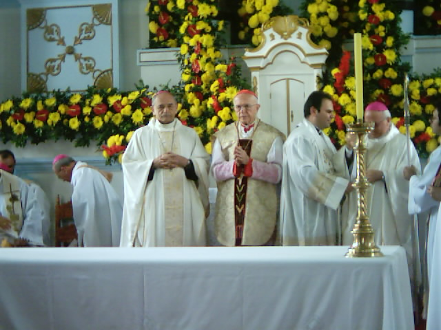 O cardeal Eugênio Sales, ao lado do irmão, Heitor, na comemoração do cinquentenário de sua ordenação episcopal e dos 60 anos de ordenação sacerdotal, em missa solene realizada na matriz de Nossa Senhora da Guia, em Acari-RN, no dia 15/08/2004.